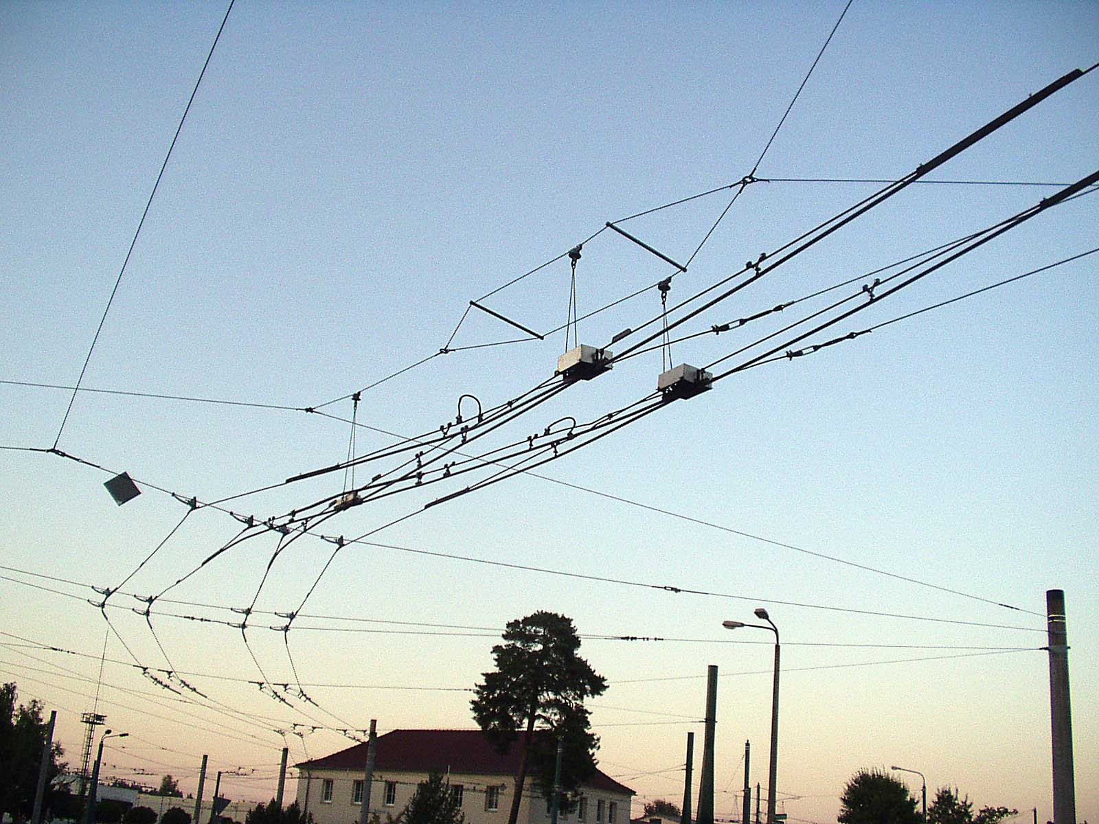 Fahrleitung eines Obusses mit Weiche